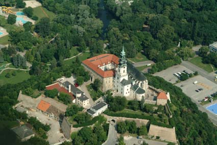 Castle - Nitra - Slovakia - Europe